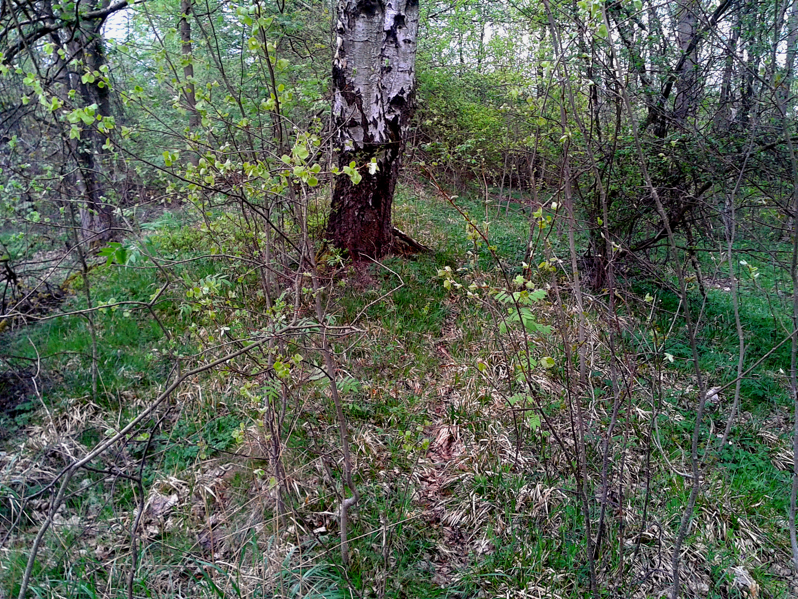 Die drei treuen Nachbarn - der aufgeschnittene mittlere Damm